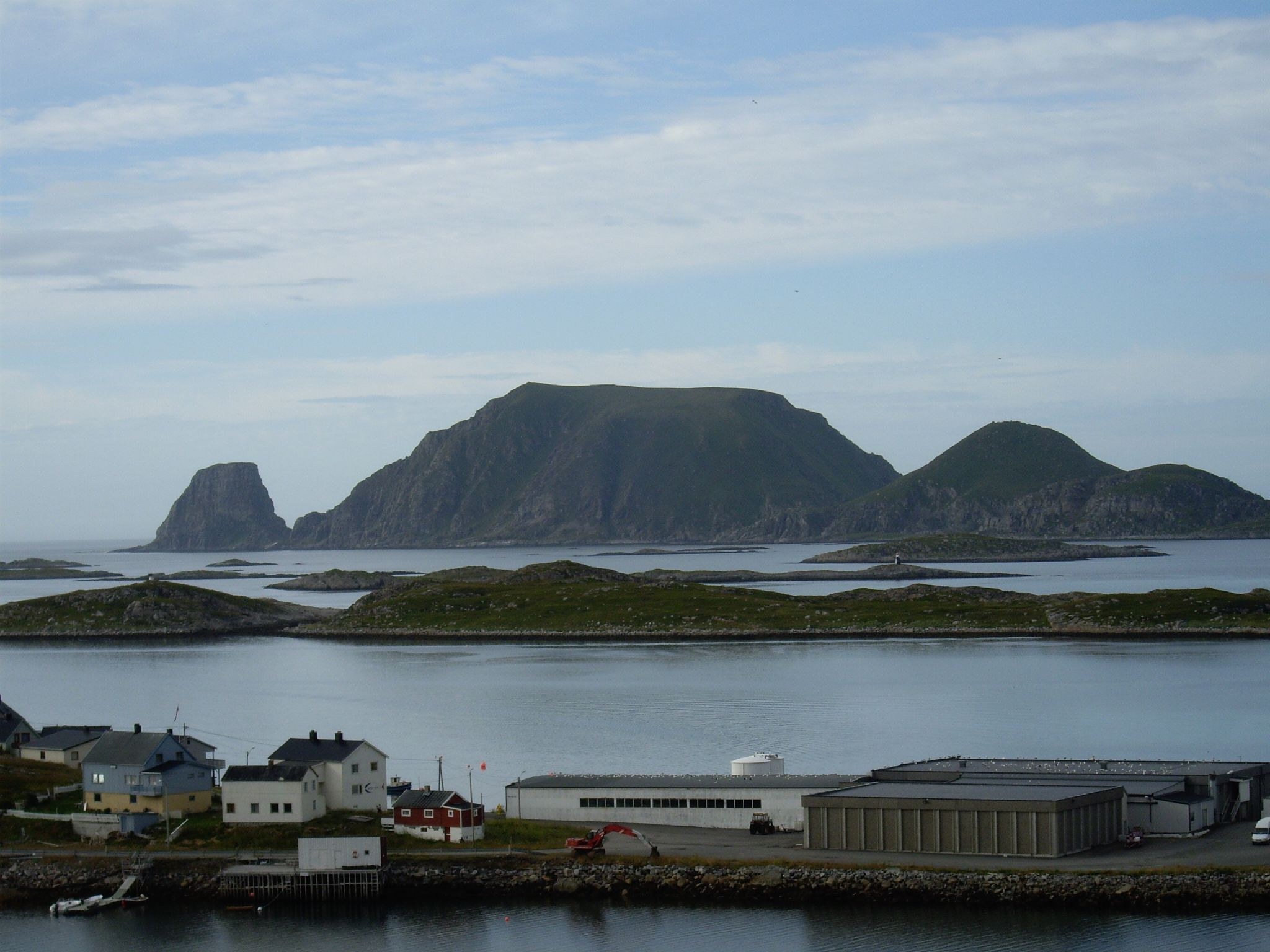 Gjesværstappan i Nordkapp kommune i Finnmark, I framgrunnen delar av Gjesvær